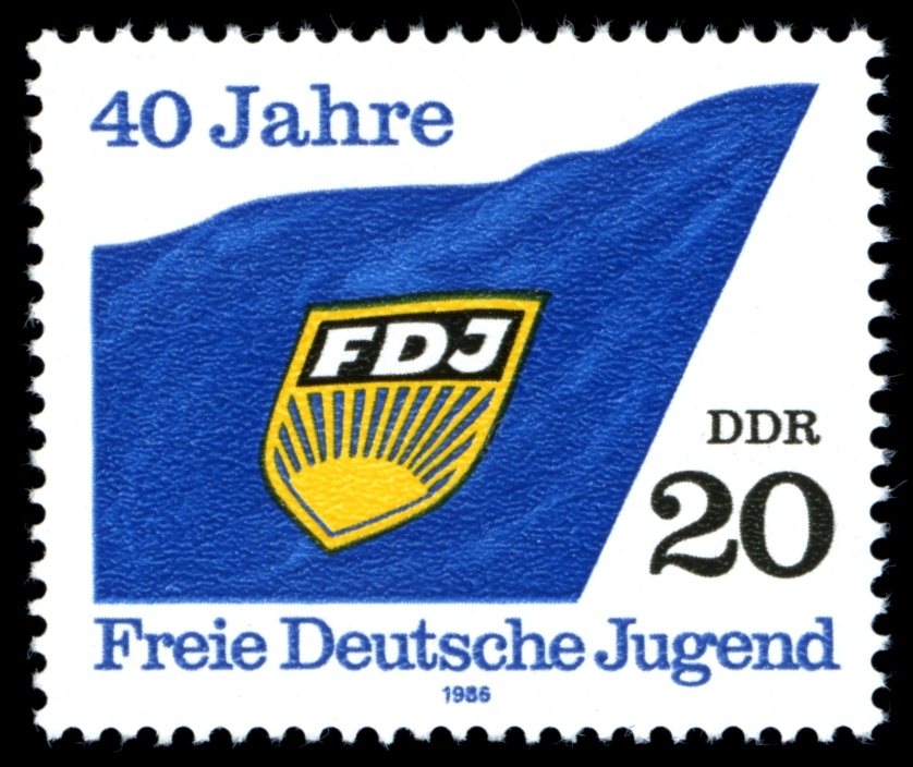 Information: Ausgabepreis: Pfennig First Day of Issue / Erstausgabetag: Auflage: Entwurf: Druckverfahren: Michel-Katalog-Nr: Ländercode-MiNr